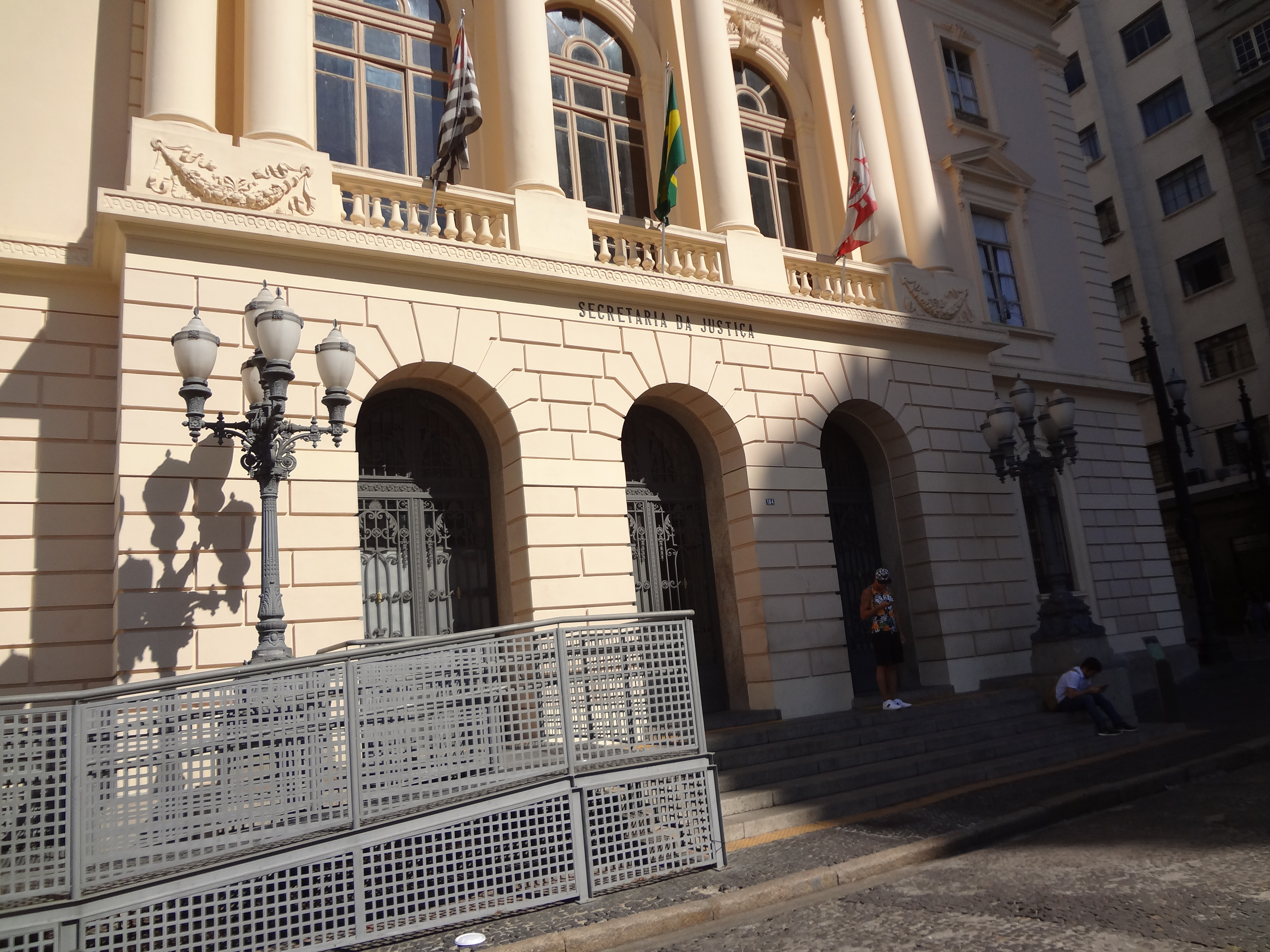 Vista direita do antigo edifício dois da Secretaria Agricultura e da Fazenda, atual Secretaria da Justiça.